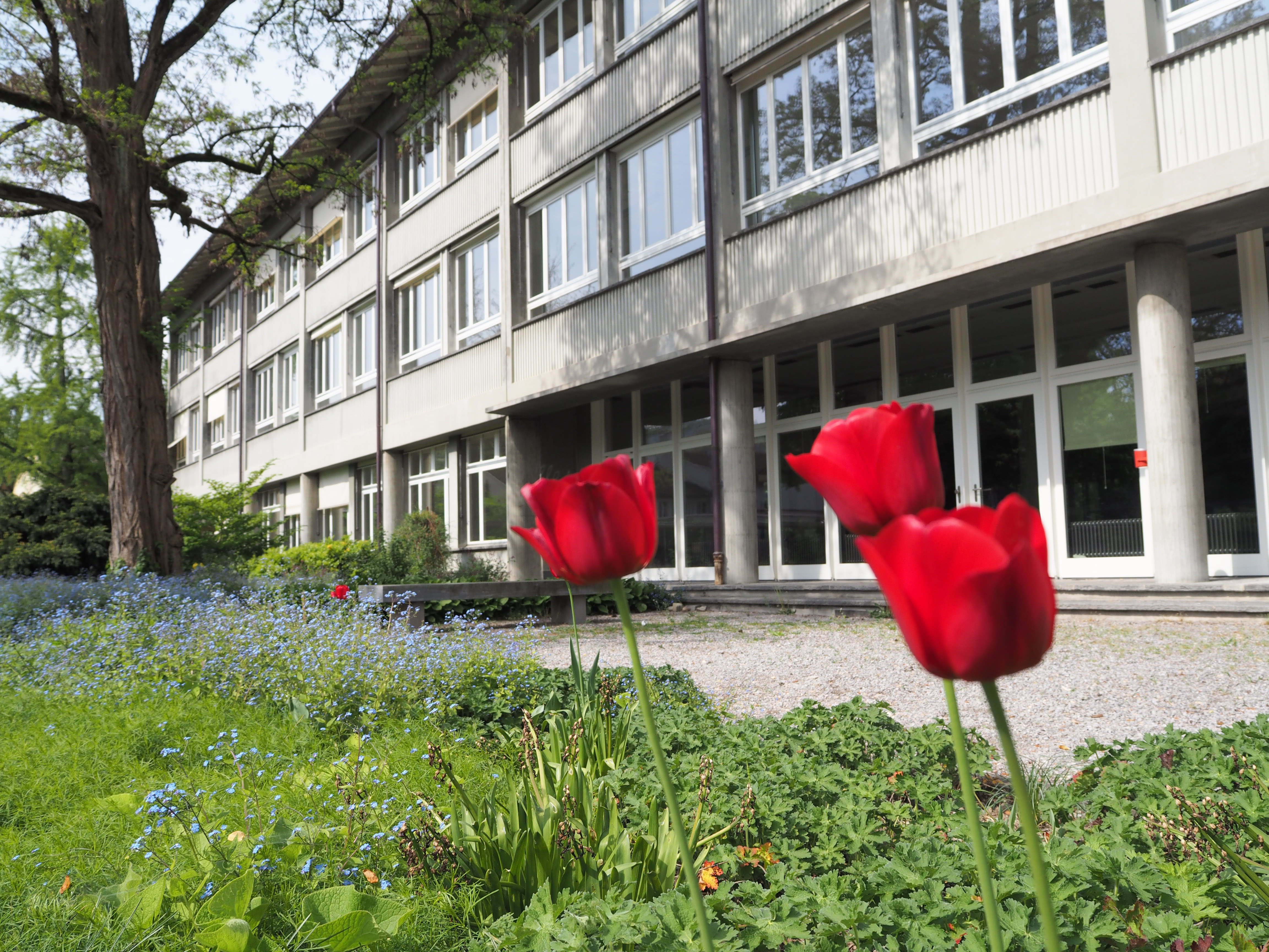 Gebäude des Fachbereich Wirtschaft an der Brückenstrasse